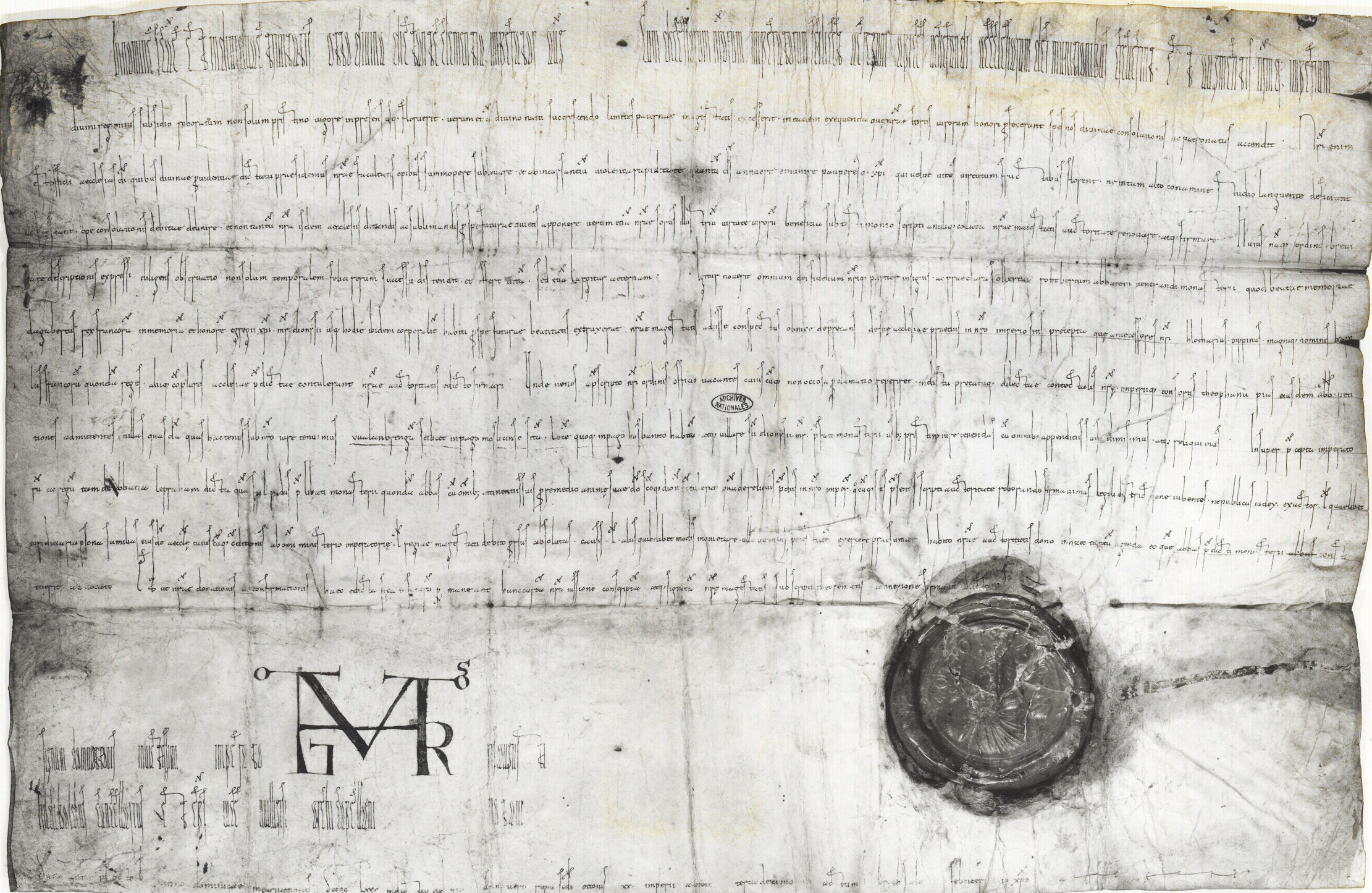 Diplôme de l'empereur Othon II confirmant à l'abbaye de Saint-Denis la possession de ses biens situés dans l'empire